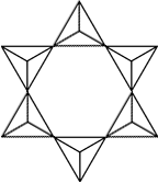 6 db SiO4 tetraéderből álló gyűrű